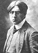 Fernando Fader